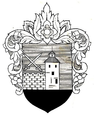 Virumaa vana vapp